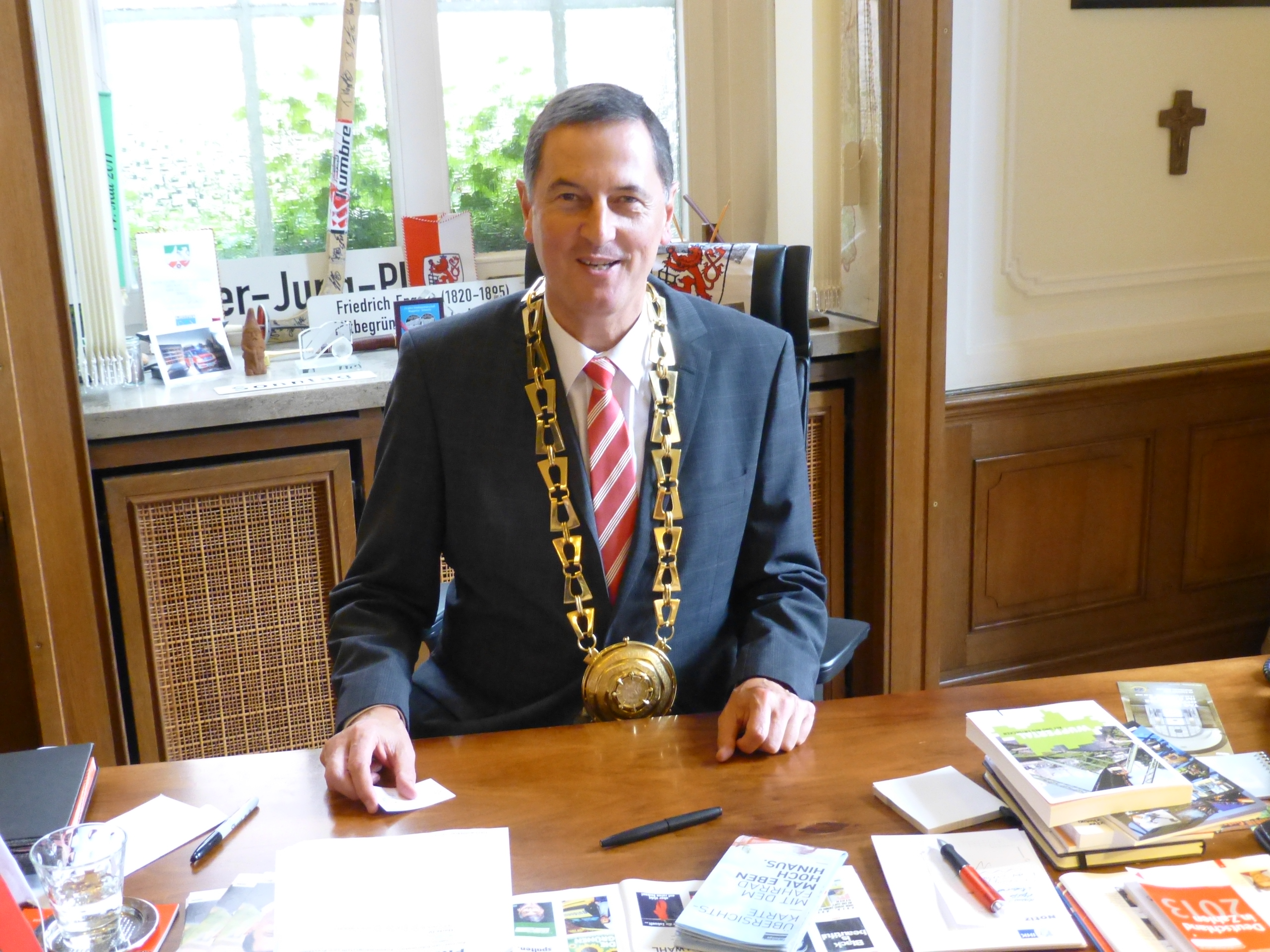 Rathaus Barmen, Wuppertal